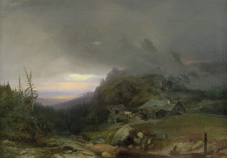 Leopold Rottmann: Alm im Gebirge bei Gewitter. Öl auf Leinwand. 49 x 70 cm. Unten links signiert "L. Rottmann".